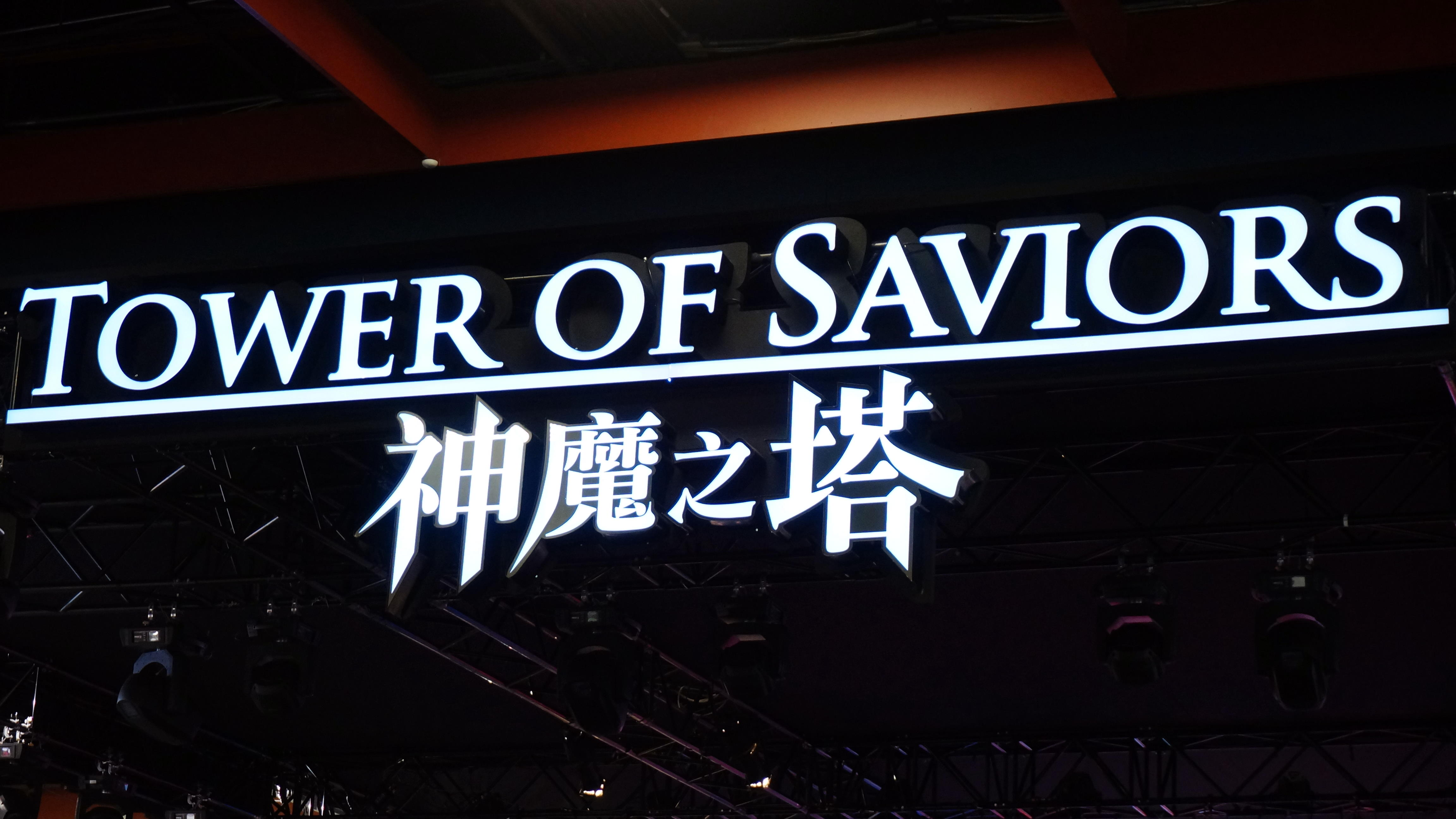 2019台北國際電玩展世貿一館展區《神魔之塔》攤位舞台上方，《神魔之塔》標題燈箱。